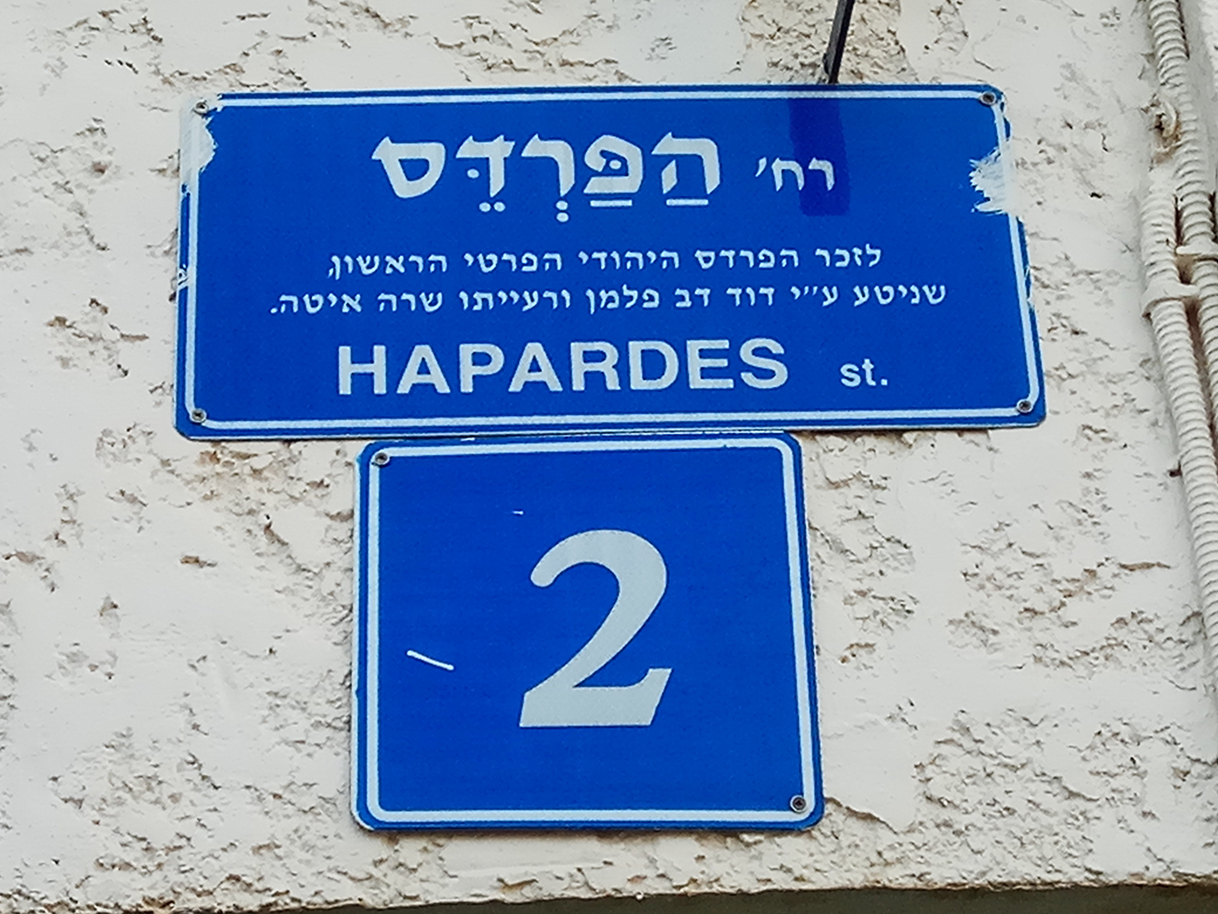 שלט ברחוב הפרדס בתל אביב